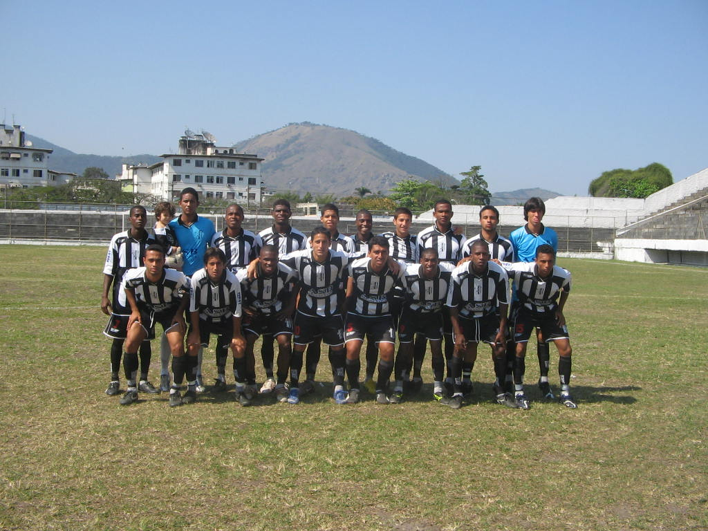 Equipe profissional do Campo Grande Atlético Clube, em 2007. Foto de Paulo Roberto Rodrigues.